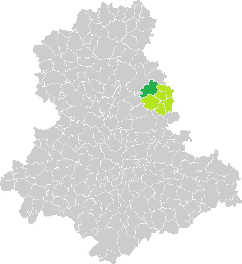 Carte de situation de la commune de Bersac-sur-Rivalier (en vert foncé) dans le votre Canton (en vert clair) sur une carte des communes de la Haute-Vienne